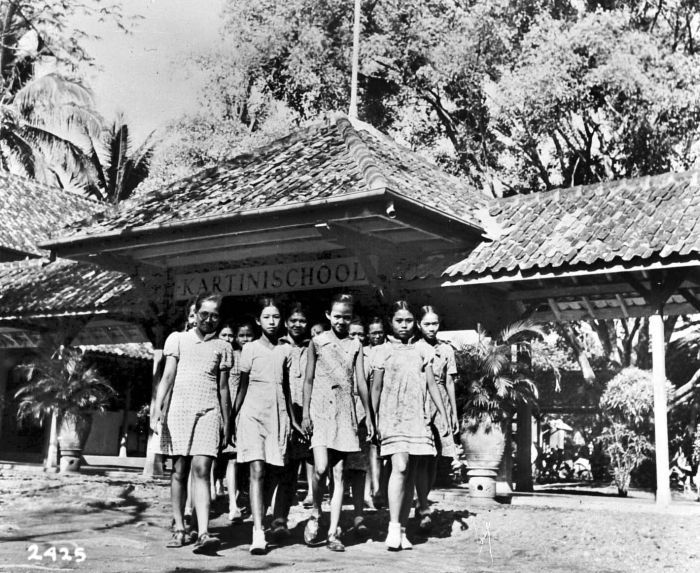 Repro Negatif. "Kartinischool" (Sekolah Kartini), sebuah Sekolah Dasar untuk anak perempuan, di Jakarta, Jawa